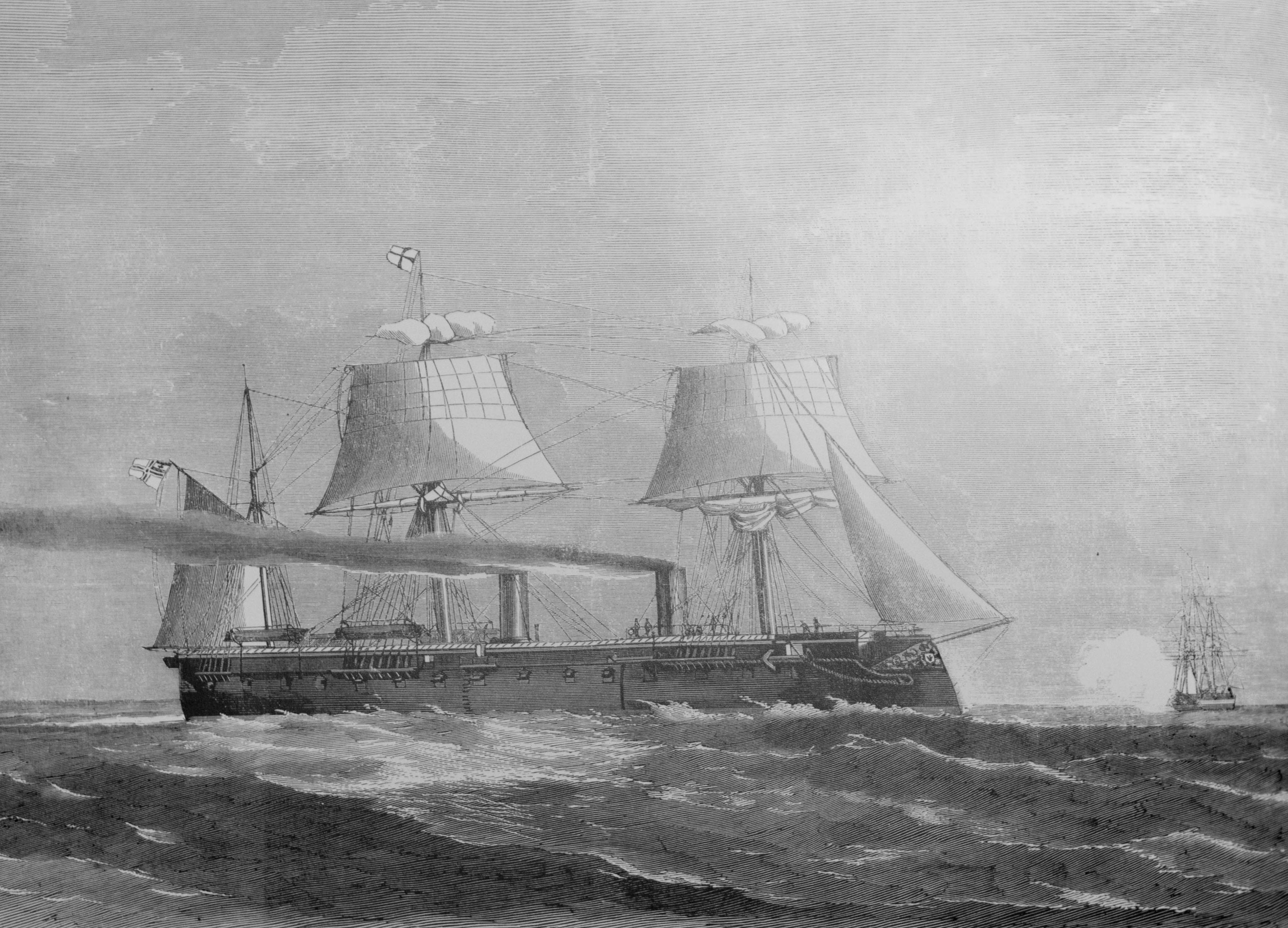 Panzerfregatte Kronprinz - aus Illustrirte Zeitung März 1868